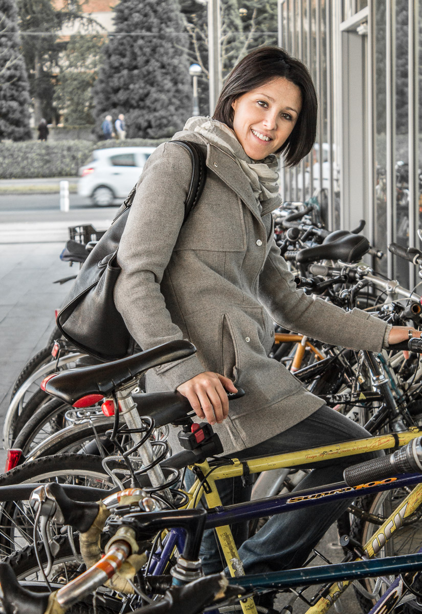 La gimnasta rítmica Tania Lamarca en la Estación de Autobuses de Vitoria en diciembre de 2016.